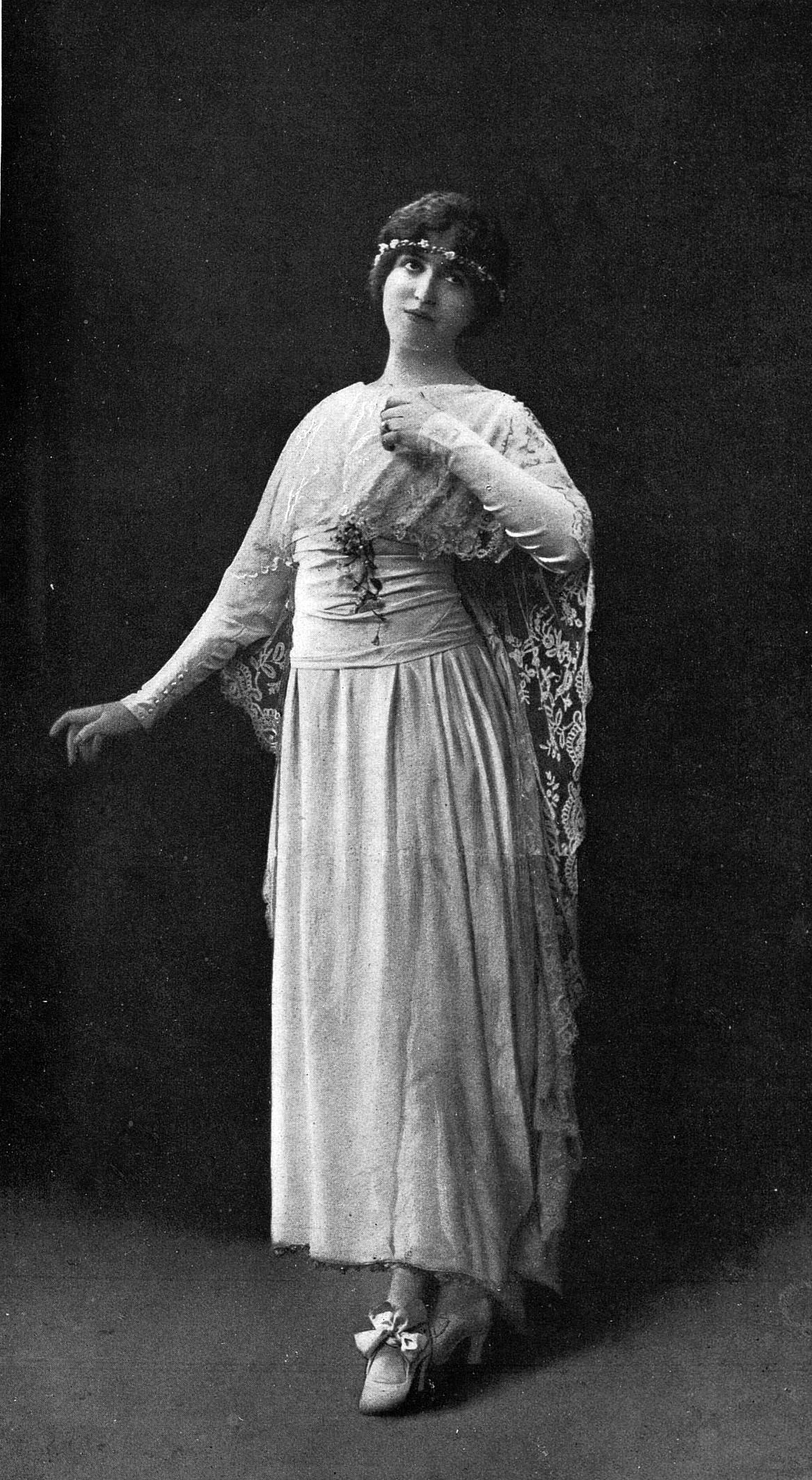 Mme J.B.G. "Robe de mariée en charmeuse blanche, garnie de dentelle point d'Angleterre ; fleurs d'oranger." Photograph in Les Modes : Revue mensuelle illustrée des arts décoratifs appliqués à la femme.